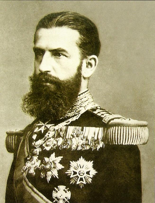 Franz Mandy - Carol I, după Proclamarea Regatului Romaniei în 1881